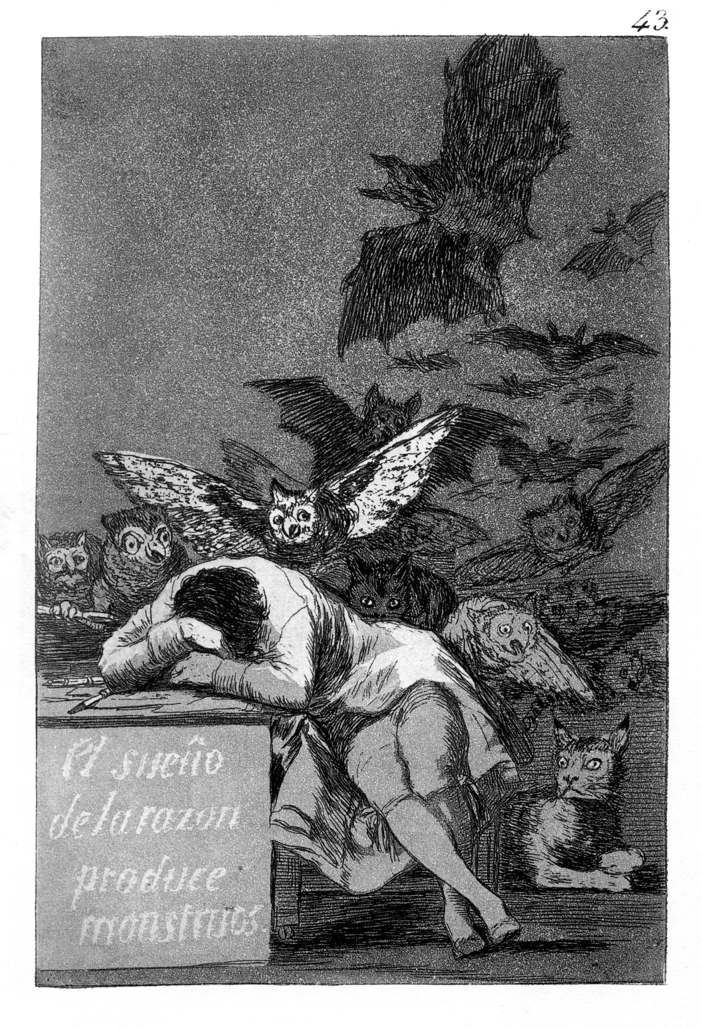 Goya: El sueño de la razón produce monstruos (Der Schlaf [Traum] der Vernunft gebiert Ungeheuer), Capricho Nr. 43, Radierung, Madrid